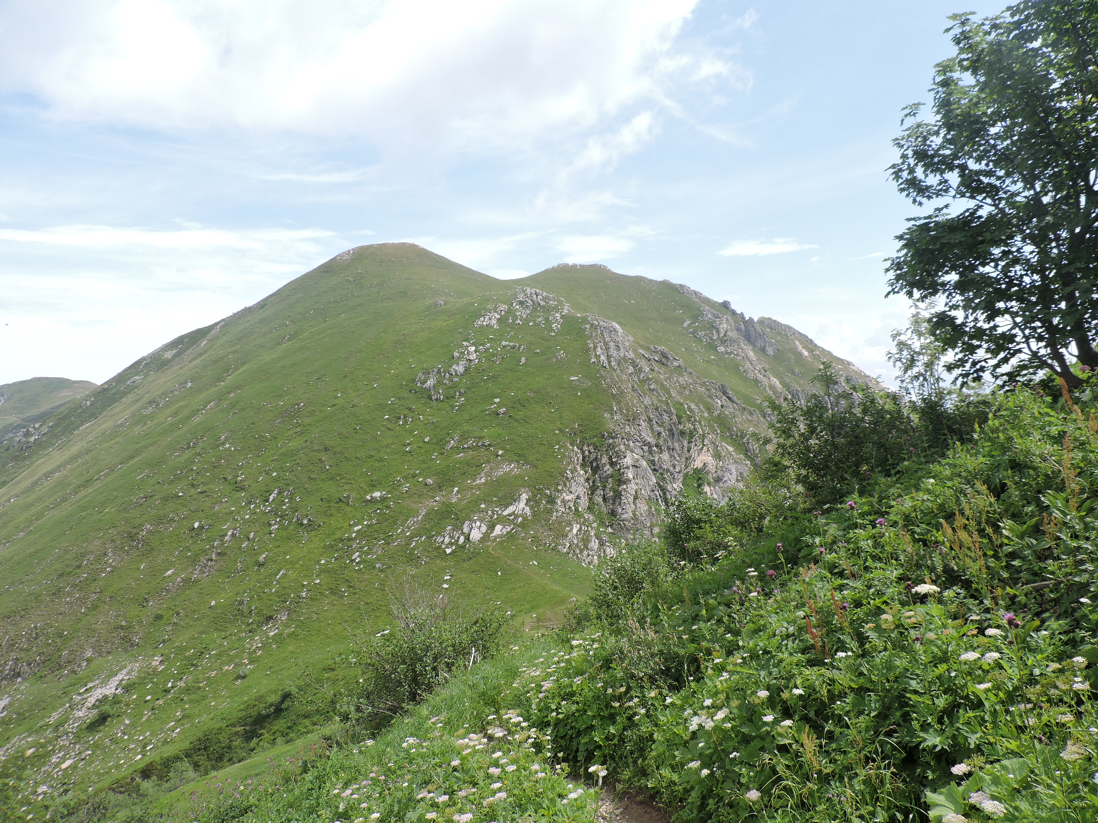 Il Monte Grosso (Alpi Liguri) visto dal da crinale est del monte Antoroto, e il valico di Colla Bassa